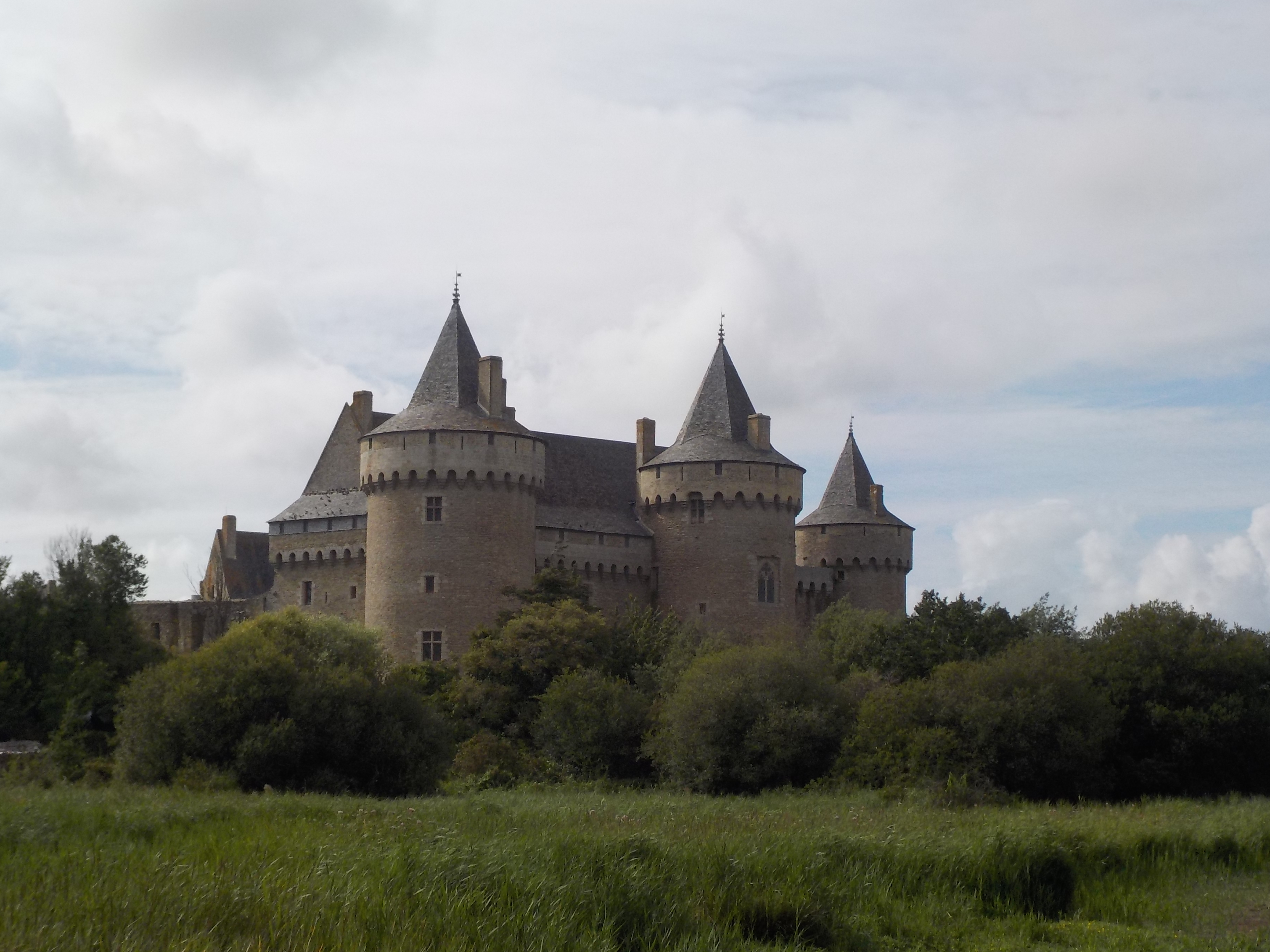 Vue du château de Suscinio